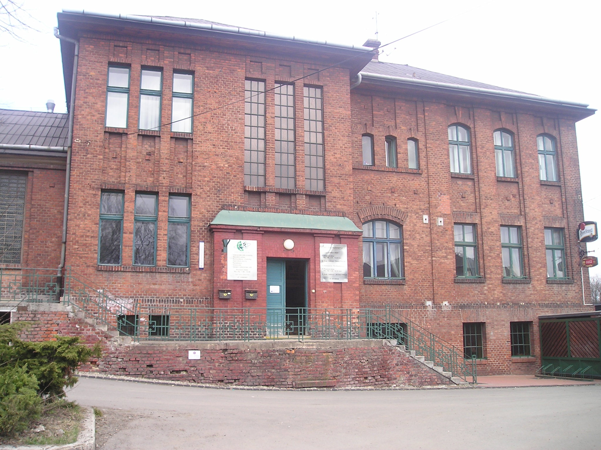 Správní budova dolu Jan Maria Ostrava